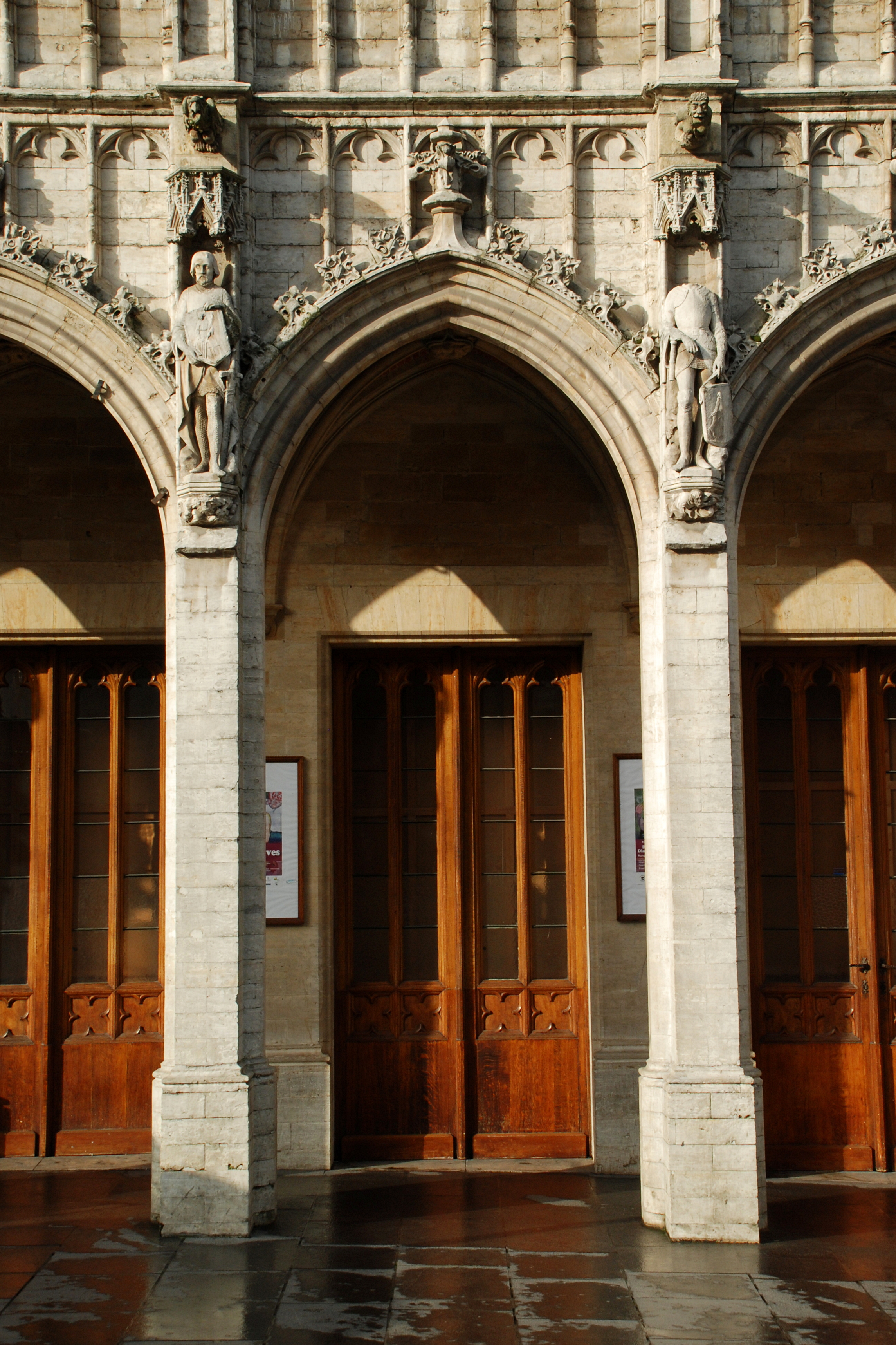 Belgique - Bruxelles - Hôtel de ville de Bruxelles